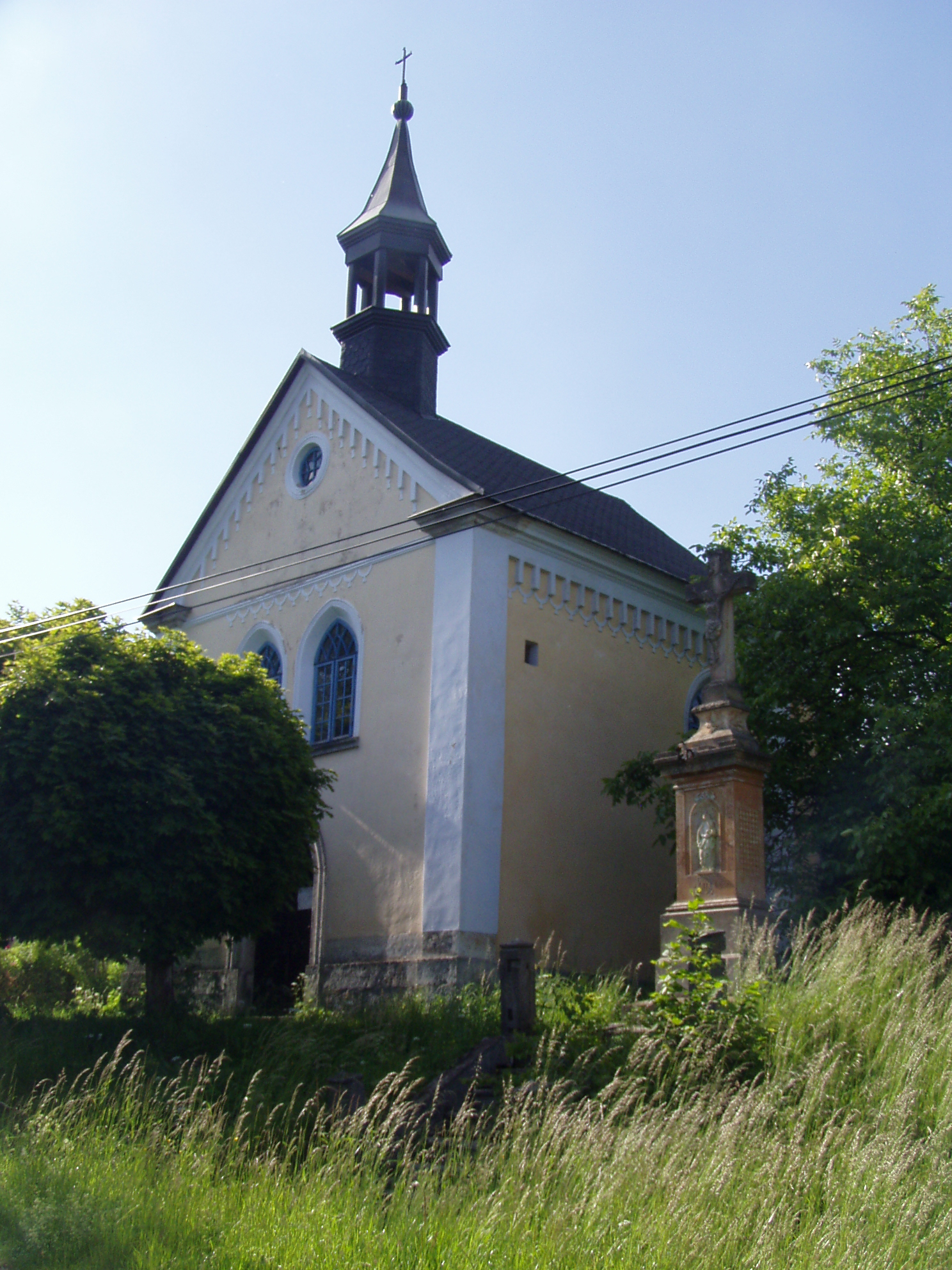 Kaple sv. Anny ve Vyhnánově (Kohoutov)